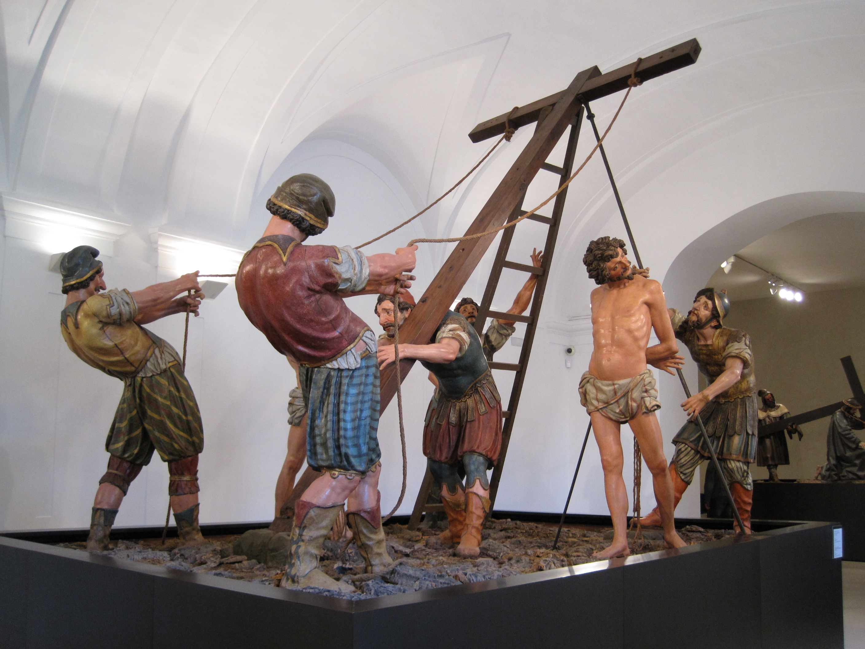 Paso de la Elevación de la Cruz (1604), obra de Francisco de Rincón. Procede de la Cofradía de Nuestra Señora de la Pasión de Valladolid. Museo Nacional Colegio de San Gregorio, Valladolid (España).